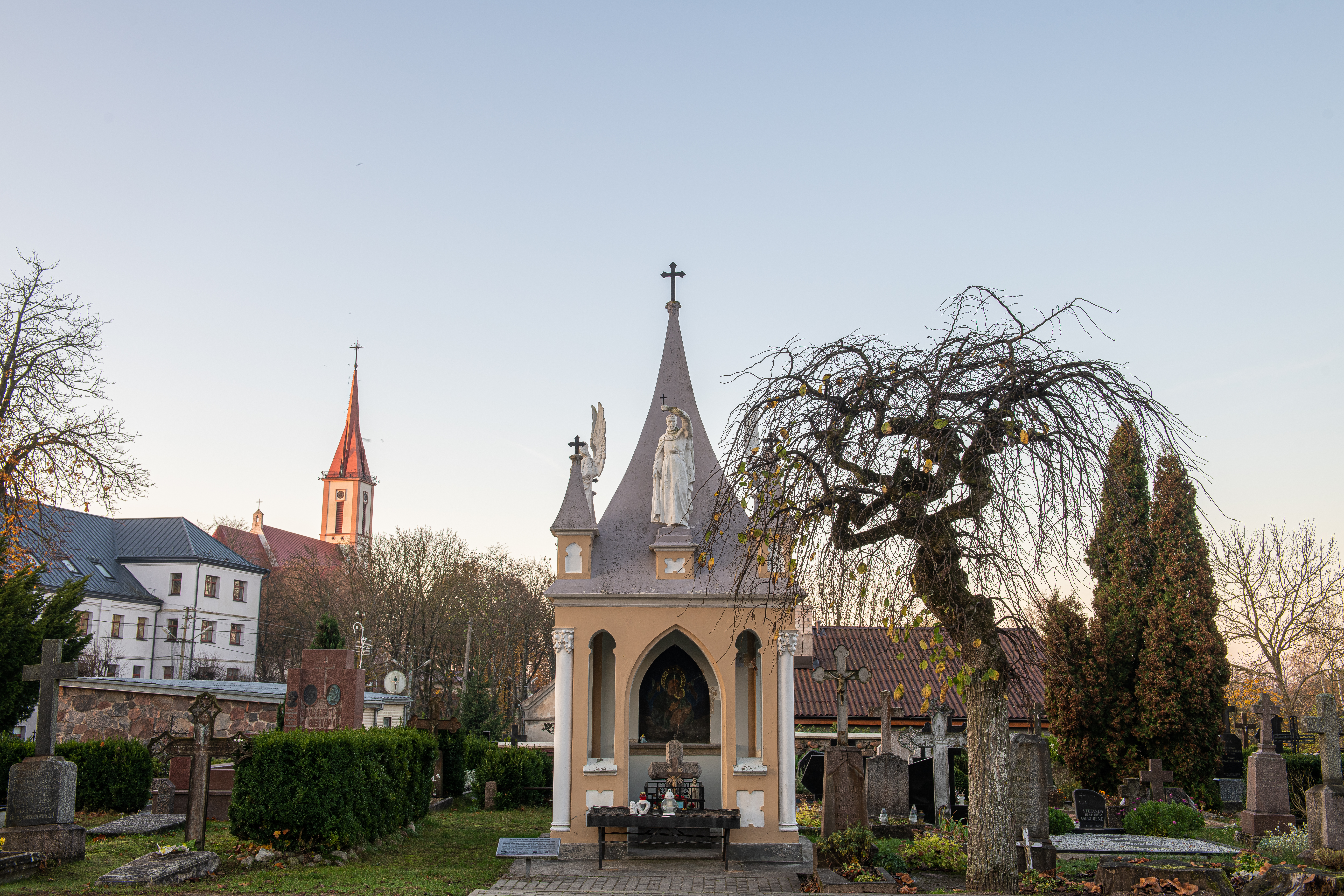 Iš priekio